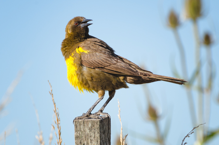 pecho amarillo común, Pseudoleistes virescens, chororó, cuarentitrés, dragón, tordo treinta, bloquence